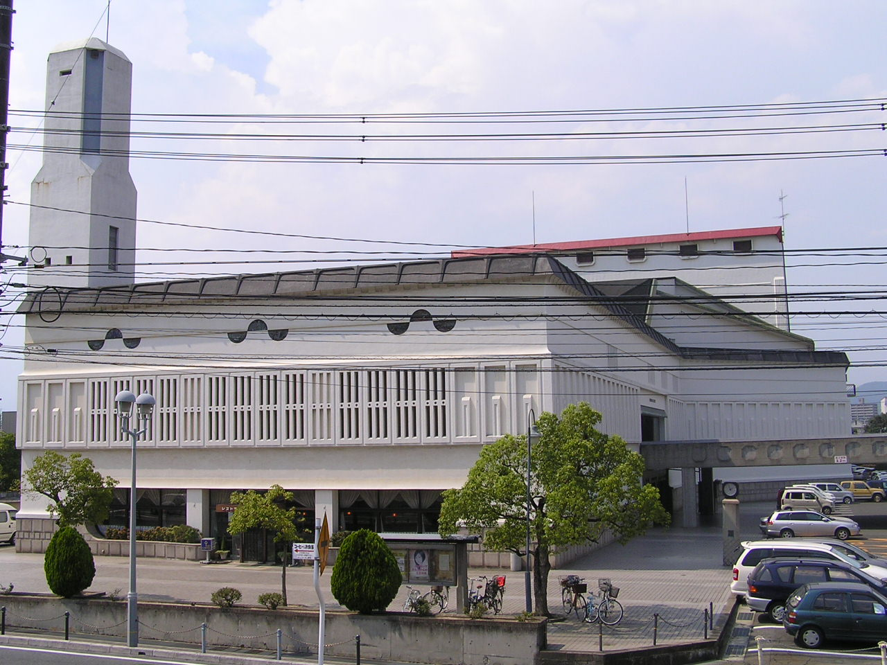 kurashiki city auditorium